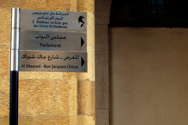 (@ Beirut, Lebanon) Yeps ...